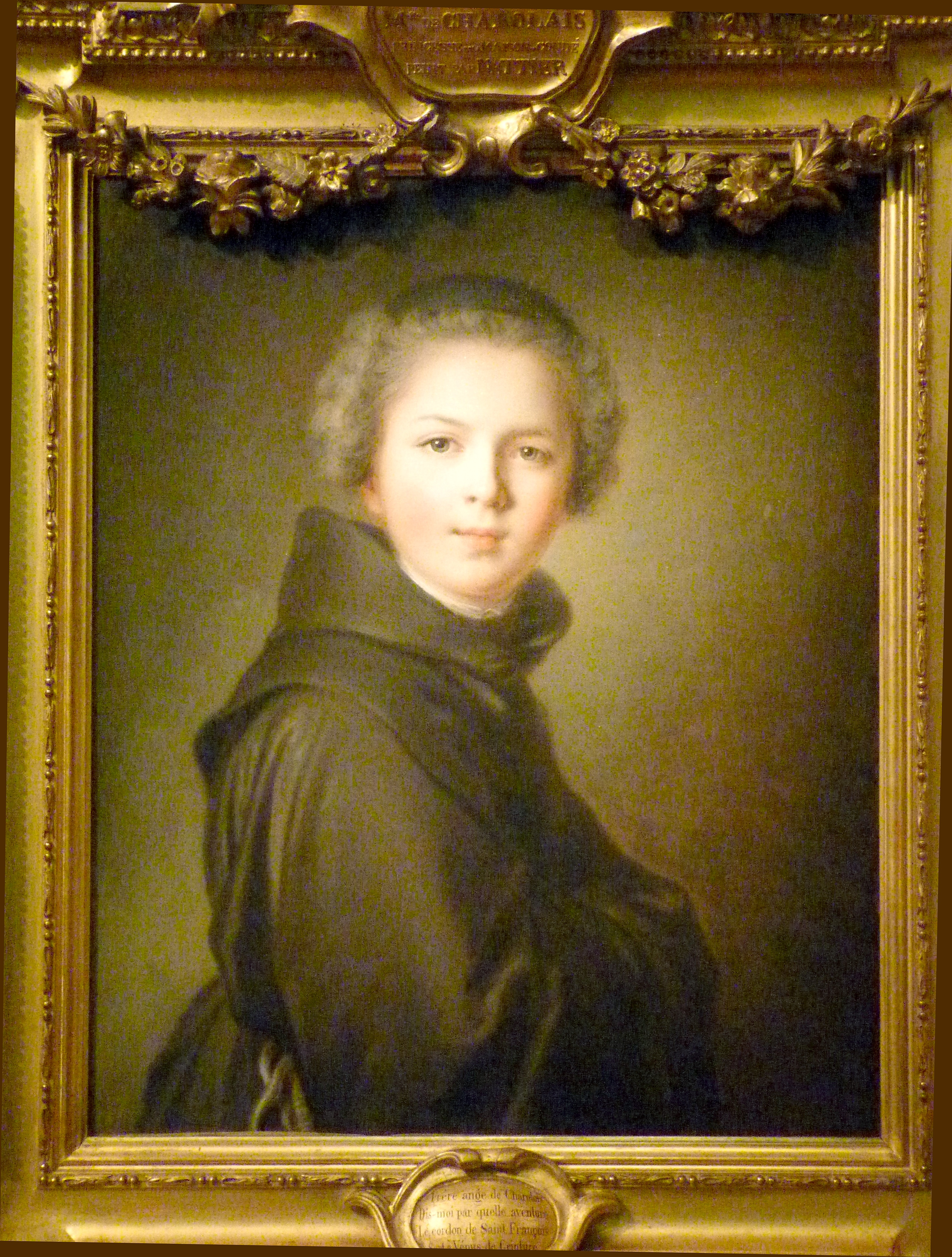 Portrait présumé de Louise-Anne de Bourbon, dite Mademoiselle de Charolais -Petite fille de Louis XIV et de Mme de Maintenon, Mlle de Charolais était réputée de mœurs légères, en repentance elle revêtait parfois la robe de bure des Franciscains.-, huile sur toiele de Jean-Marc Nattier. Collection particulière de Georges de Lastic (1927-1988) lors de l'exposition Le cabinet d'un amateur, n°14, au musée de la chasse et de la nature, Paris (décembre 2009-mars 2010). Petite fille de Louis XIV et de Mme de Maintenon, Mlle de Charolais était réputée de mœurs légères, en repentance elle revêtait parfois la robe de bure des Franciscains.